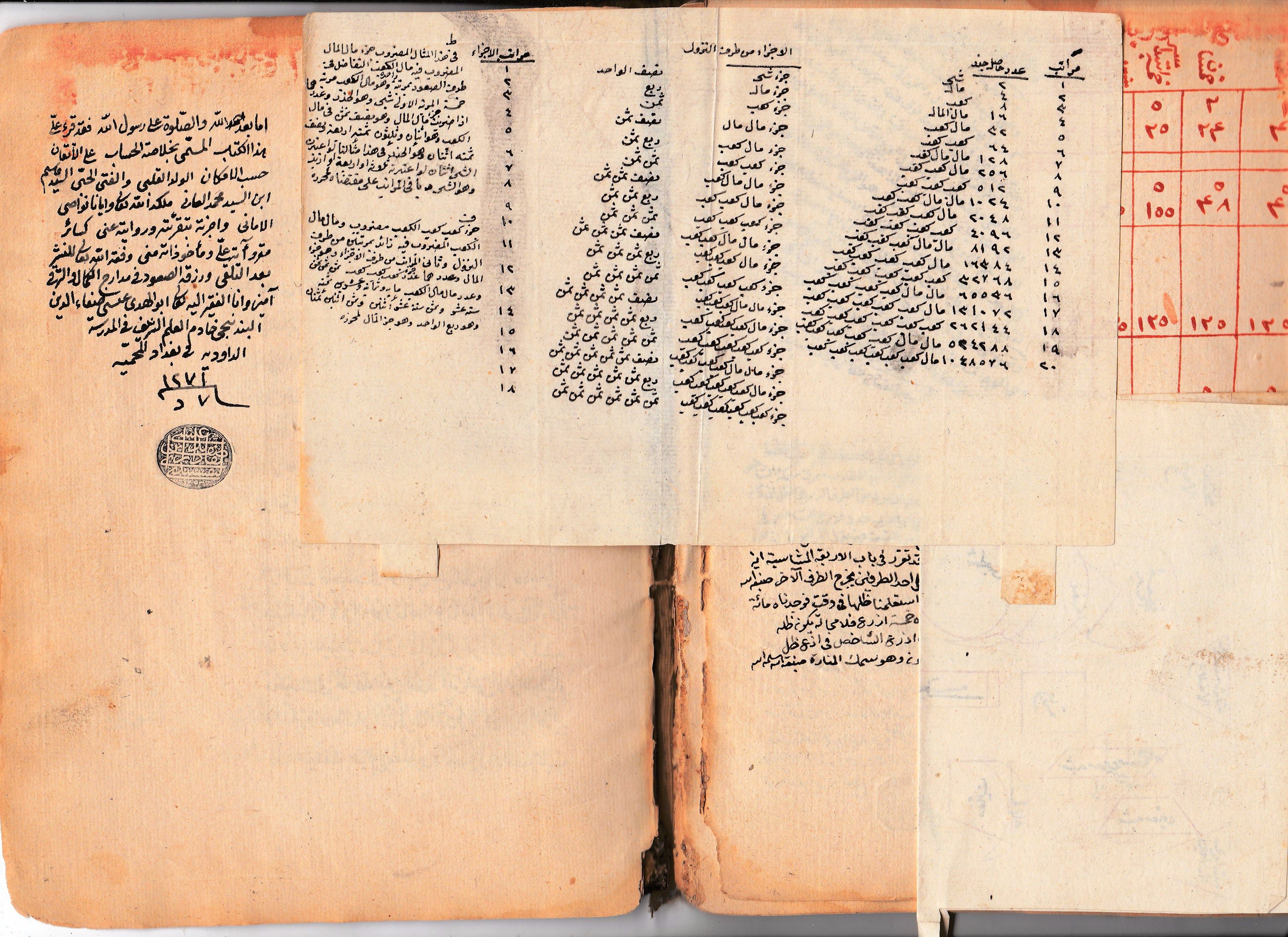 الصفحة الأخيرة من كتاب خلاصة الحساب من تأليف بهاء الدين العاملي (المتوفى عام 1035 هجرية) ونسخ المخطوط في عام 1165 هجري/1751م، ولقد اشترى المخطوط واقتناه الشيخ قاسم أفندي المفتي عام 1270 هجري/ 1853م، ويوجد على غلاف الكتاب ختم ملا قاسم مع ختم الناسخ للمخطوط، ثم قرأ الملا قاسم الكتاب على شيخه أبو الهدى عيسى البندنيجي الذي يوجد ختمه وكتابته في آخر صفحة في المخطوط عام 1271هجري /1854م، وعيسى البندنيجي هو المدرس في المدرسة الداودية ببغداد